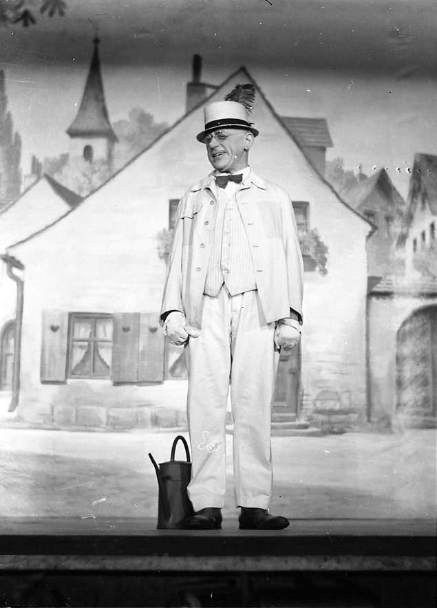 Carows Lachbühne: Fredy Sieg (im hellen Anzug)